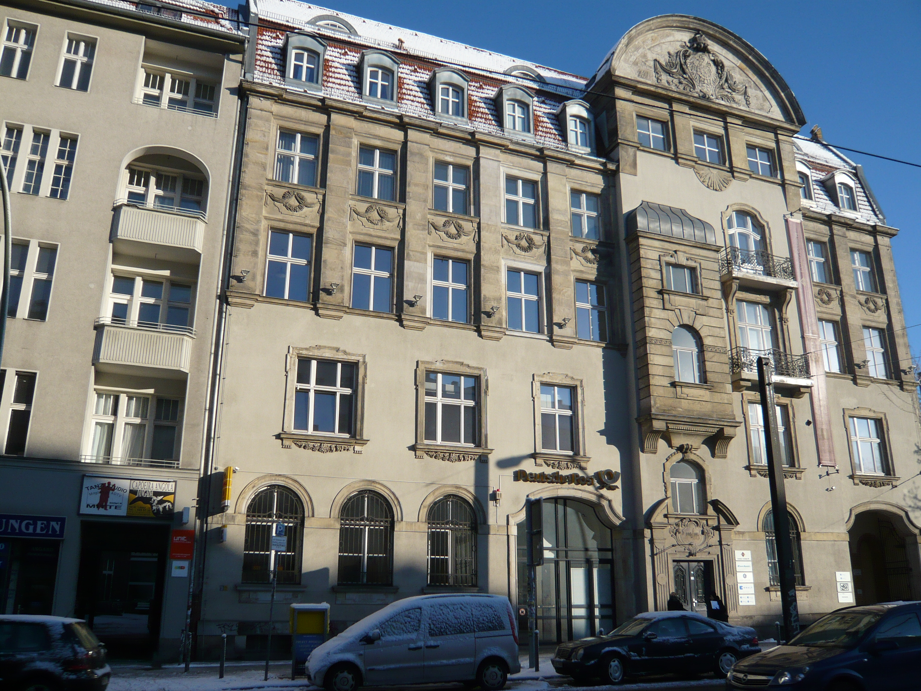 Torstraße 105 in Berlin-Mitte: Postamt